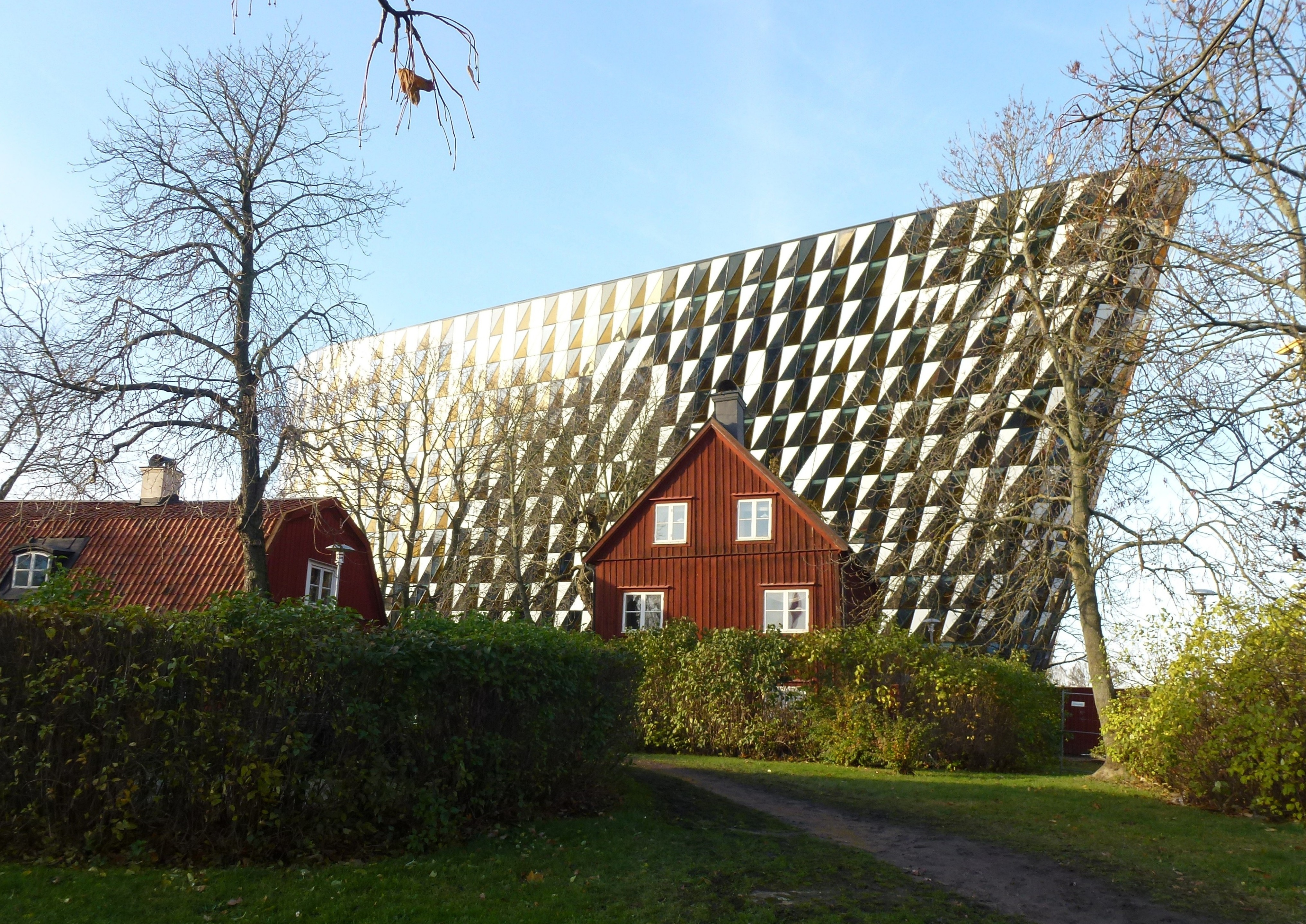 Karolinska institutets aula med gården "Stenbrottet"